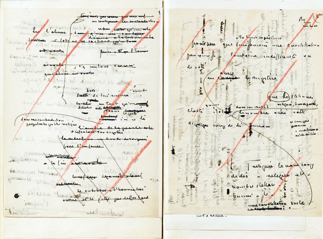 Premier état du Coup de dés. Manuscrit autographe.